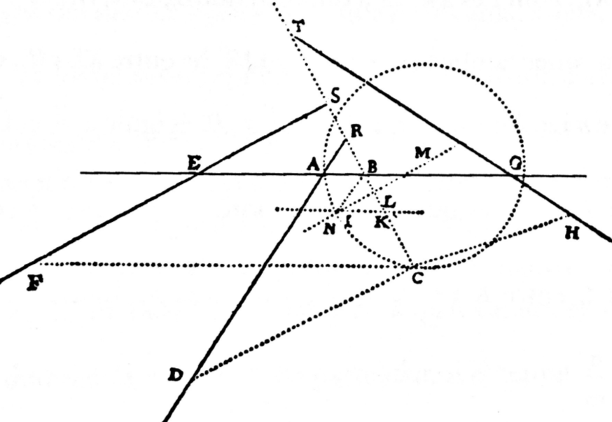 Problema de Pappos de 4 rectes a la Geometria de Descartes